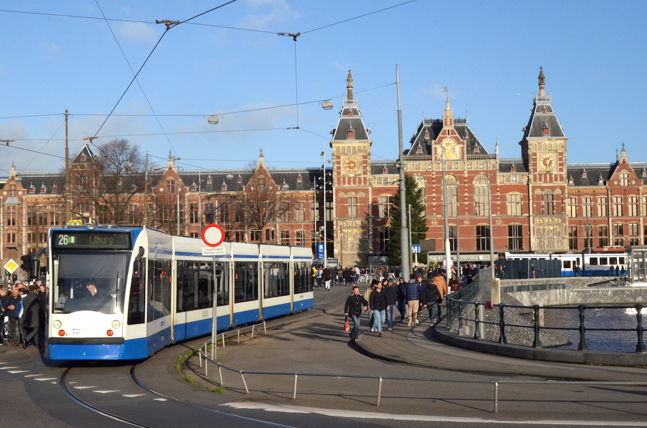 Lijn 26 op de Middentoegangsbrug voor het Centraal Station van Amsterdam; 31 december 2015. Foto: Erik Swierstra.